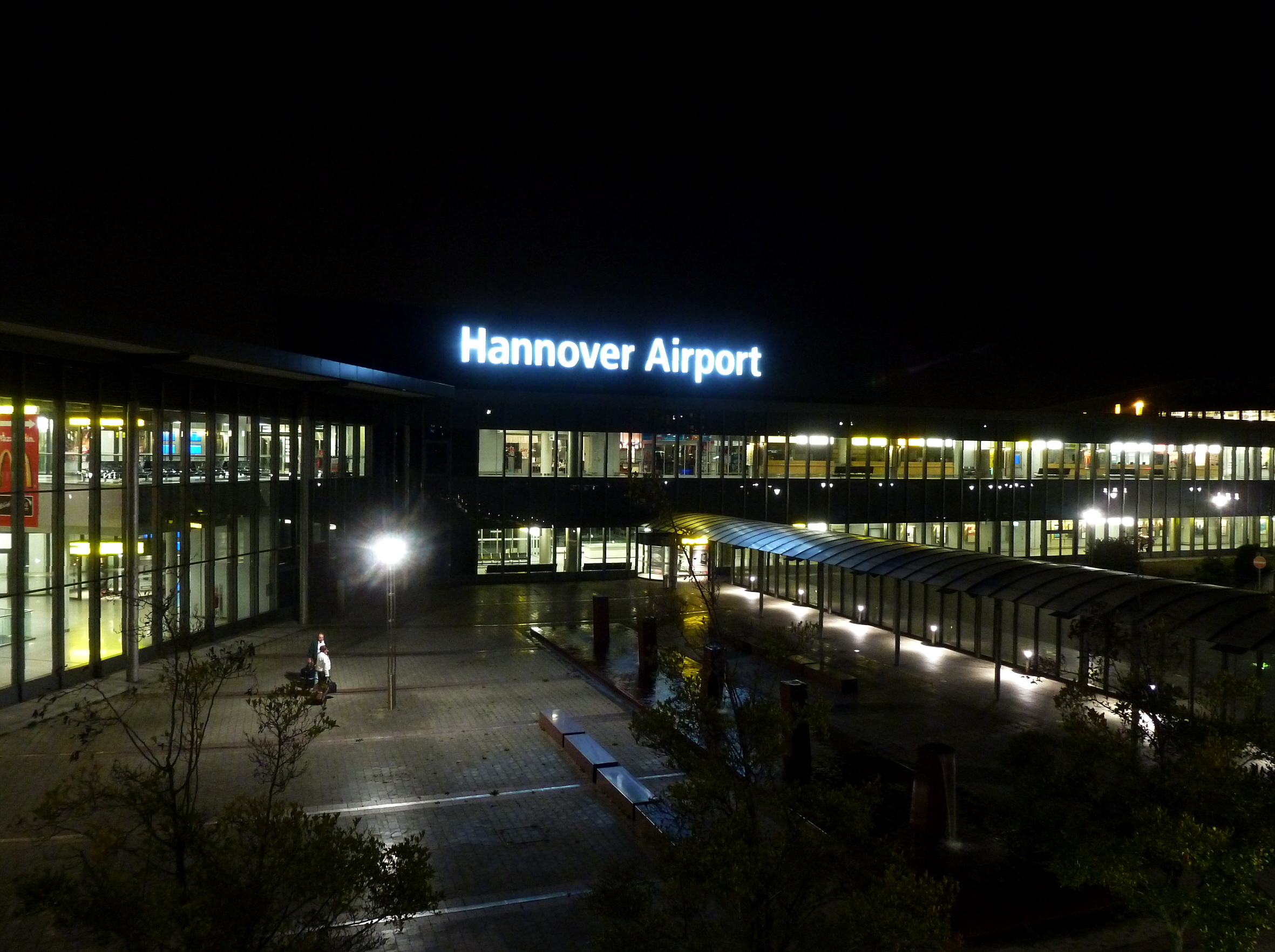 Nachtaufnahme des Hannover Flughafen (HAJ) mit Teilansicht der Abfertigungsgebäude.